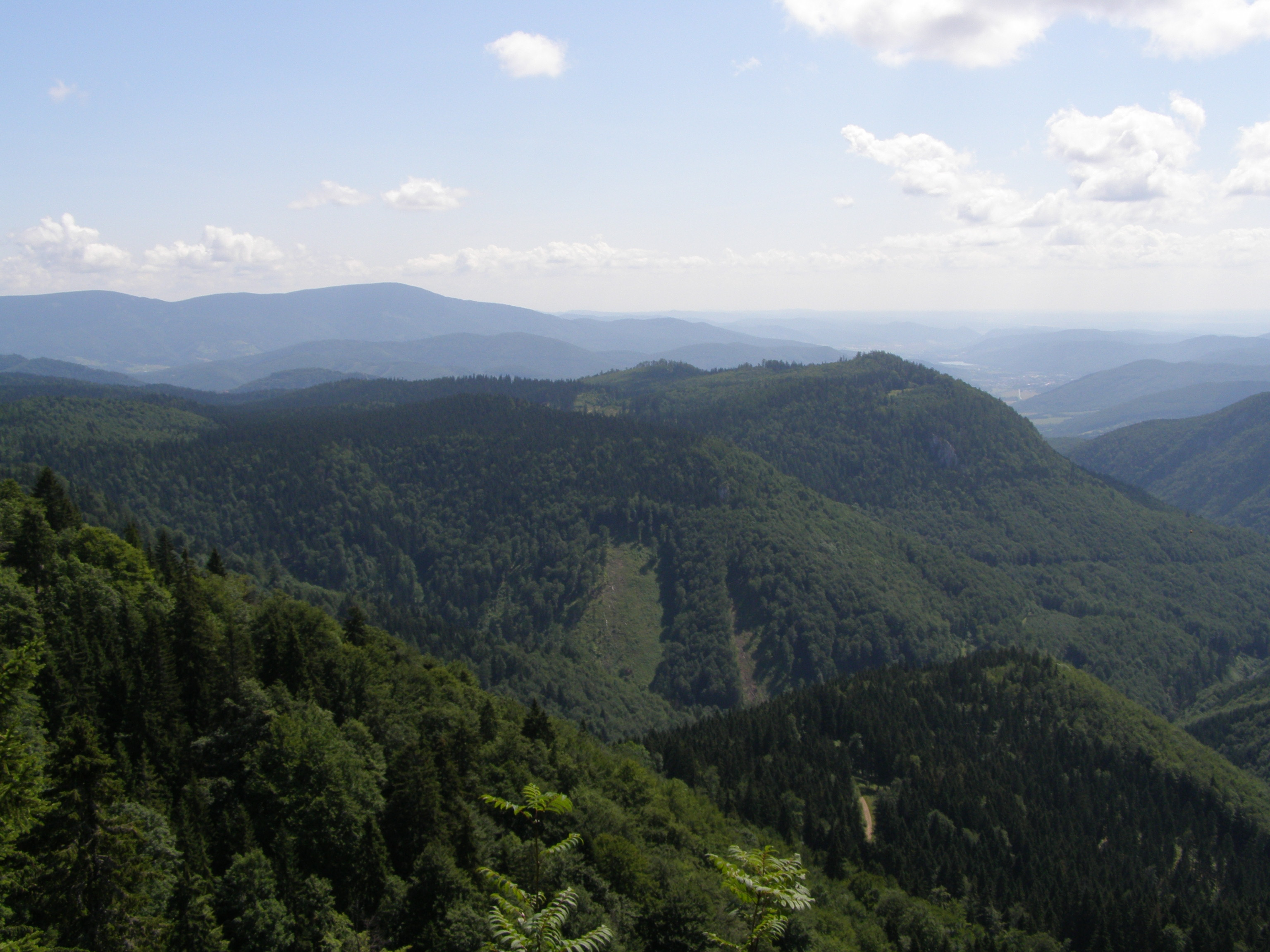 Slovenské rudohoří, Spišsko-gemerský kras, Muráňská planina, pohled z jižního úbočí vrcholu Kľak (1409 m) na východ, v popředí vrchol Pavelková (1144 m), za ním hřeben Šlance (1042 m) - Cigánka (935 m, Muráňský hrad), zcela vzadu vlevo hřeben Faltenov vrch (1338 m) - Kohút (1409 m)